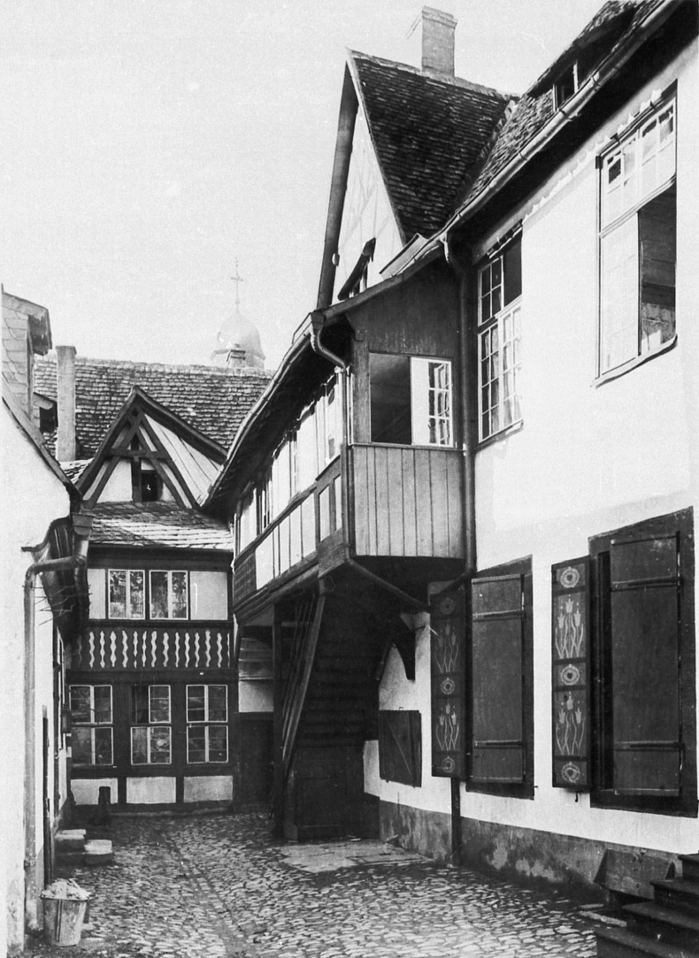 Edelsheimer Hof in der Hanauer Altstadt